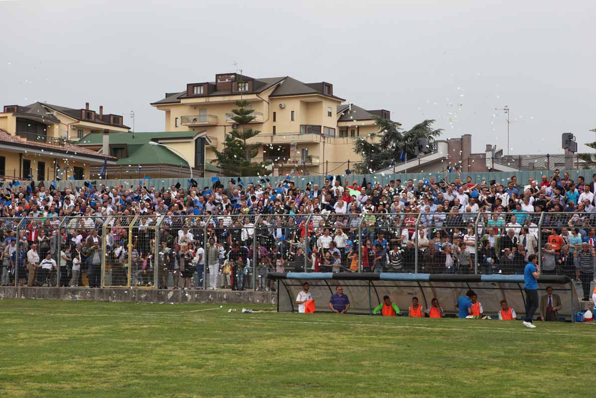 Unione Sportiva Gladiator - Carano